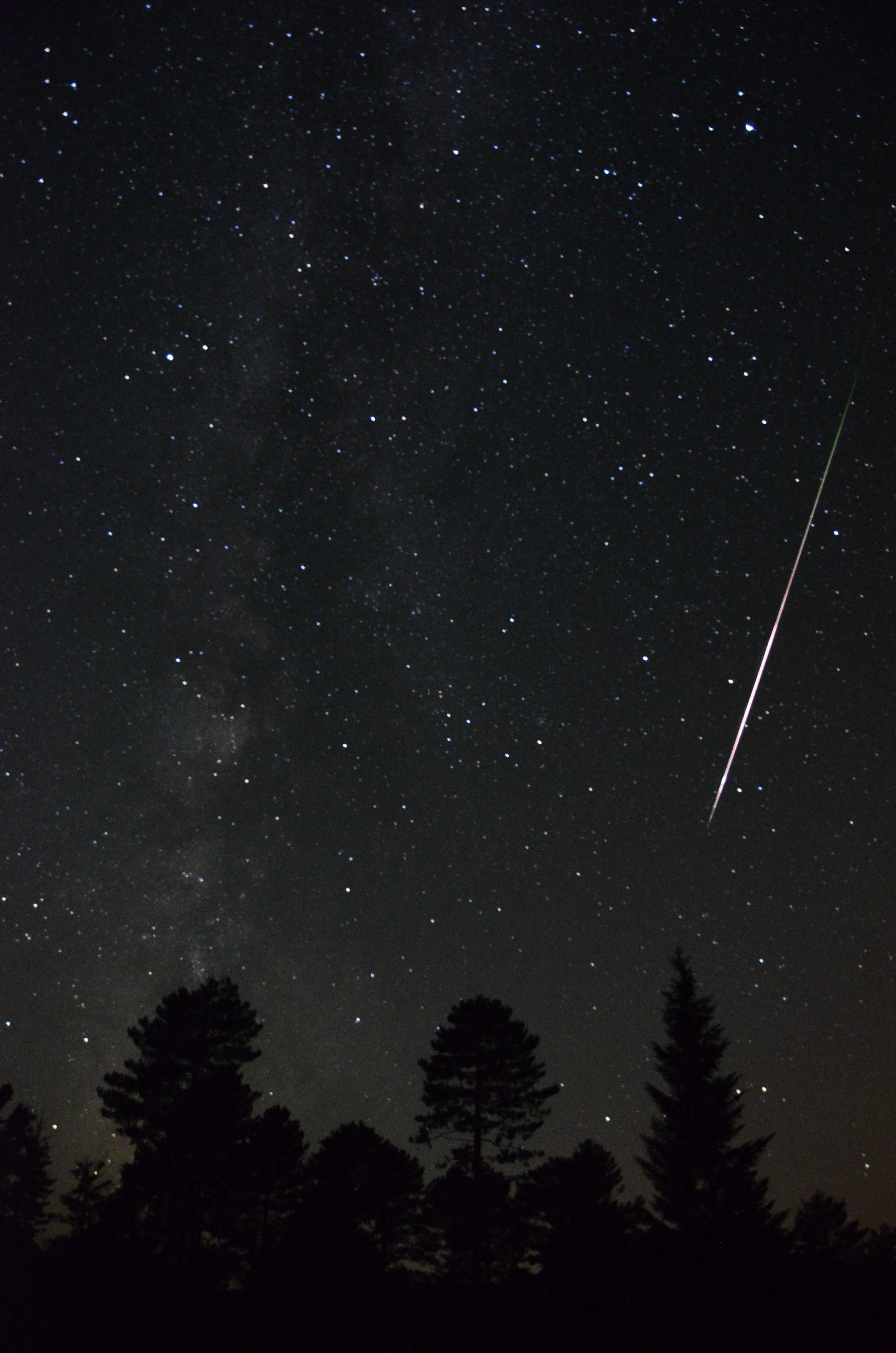 Parc naturel régional de Corse